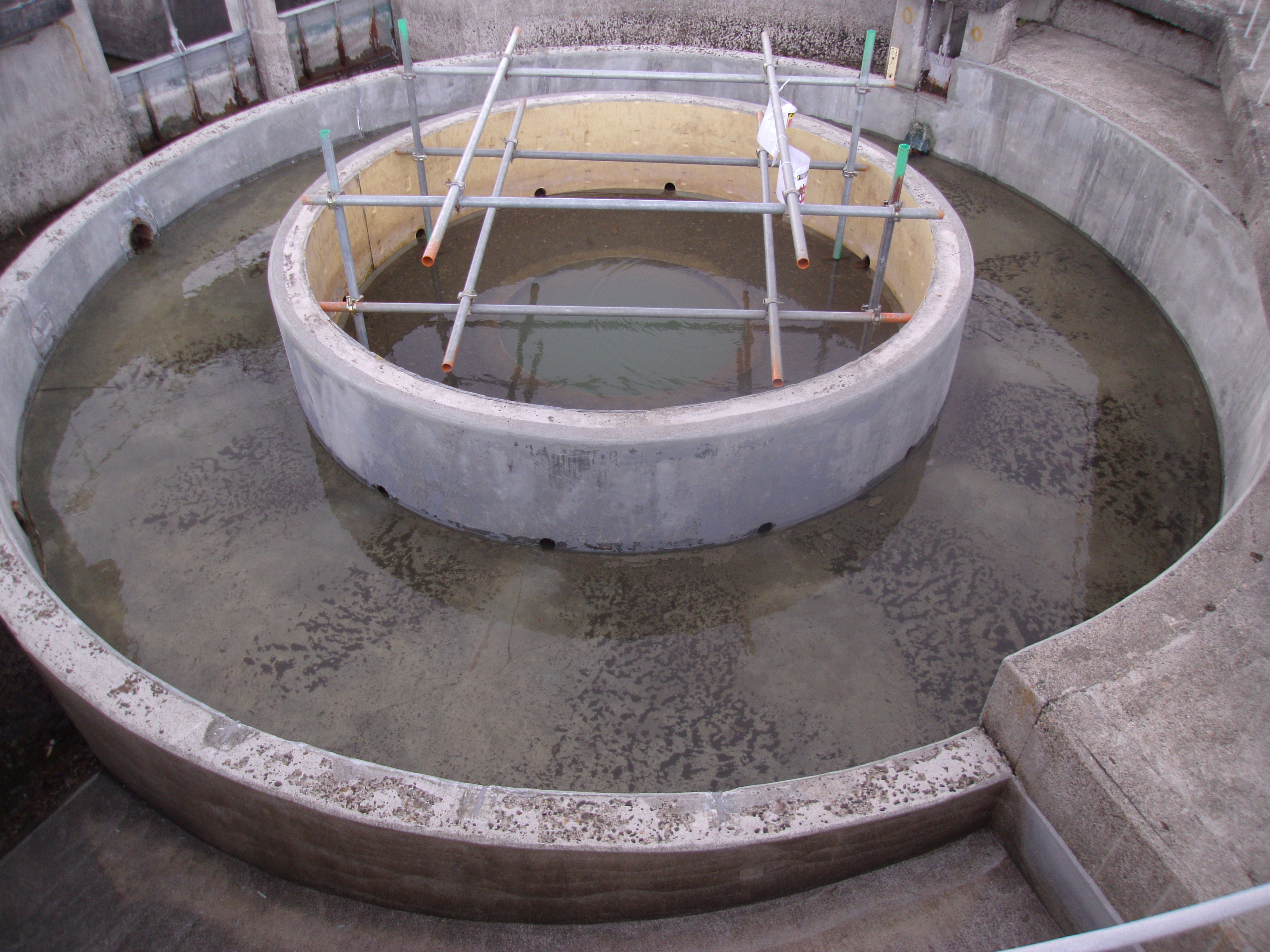 淡山疎水（淡河疎水＋山田川疎水）の水流を分配する老ノ口の円筒分水